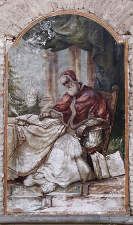 Papà Giulio II (Chiesa parrocchiale di San Felice sul Panaro)